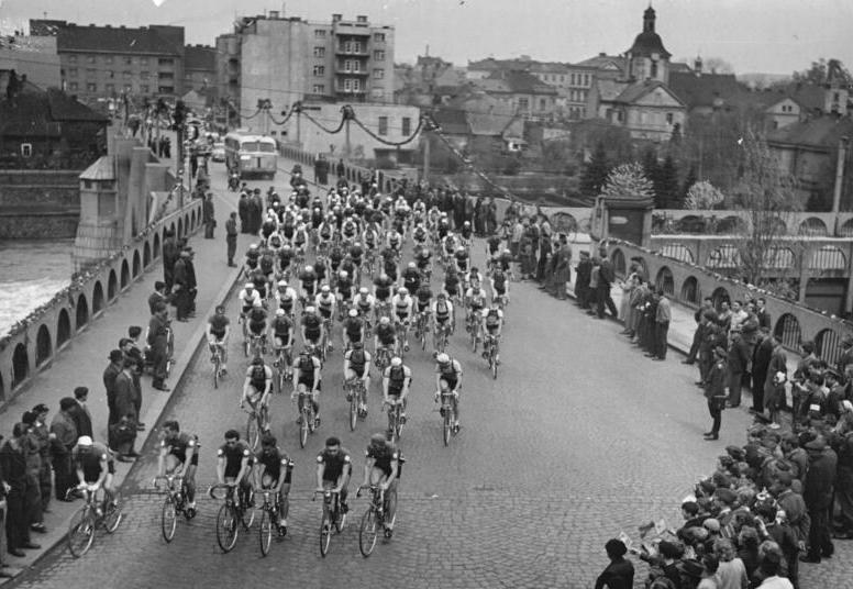 VIII. Friedensfahrt, Fahrt durch Kolin Zentralbild CTK-II Bey-Ho 4.5.1955 - Die zweite Etappe der VIII. Internationalen Friedensfahrt Prag-Berlin-Warschau 1955. Die schwere zweite Etappe Kolin-Brno führte über 185 km. Sieger dieser Teilstrecke wurde der Meister des Sports Jan Kubr (CSR). UBz: Das Rennen war noch neutralisiert, als die Mannschaften durch Kolin fuhren.